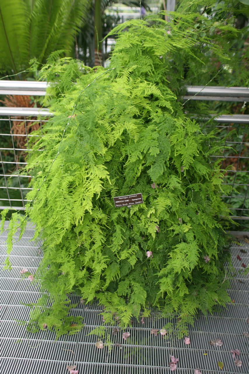 Asparaagus plumosus Asparagus Family - Asparagaceae